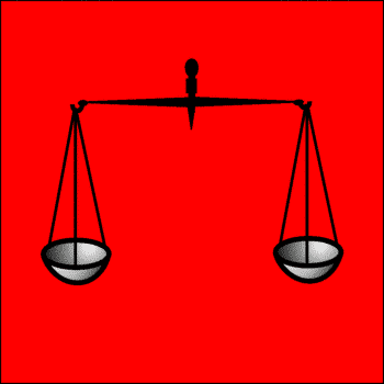 baron conseiller en cours impérial